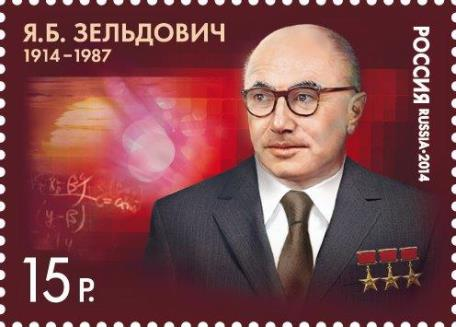 100 лет со дня рождения Я.Б. Зельдовича (1914–1987), физика-теоретика